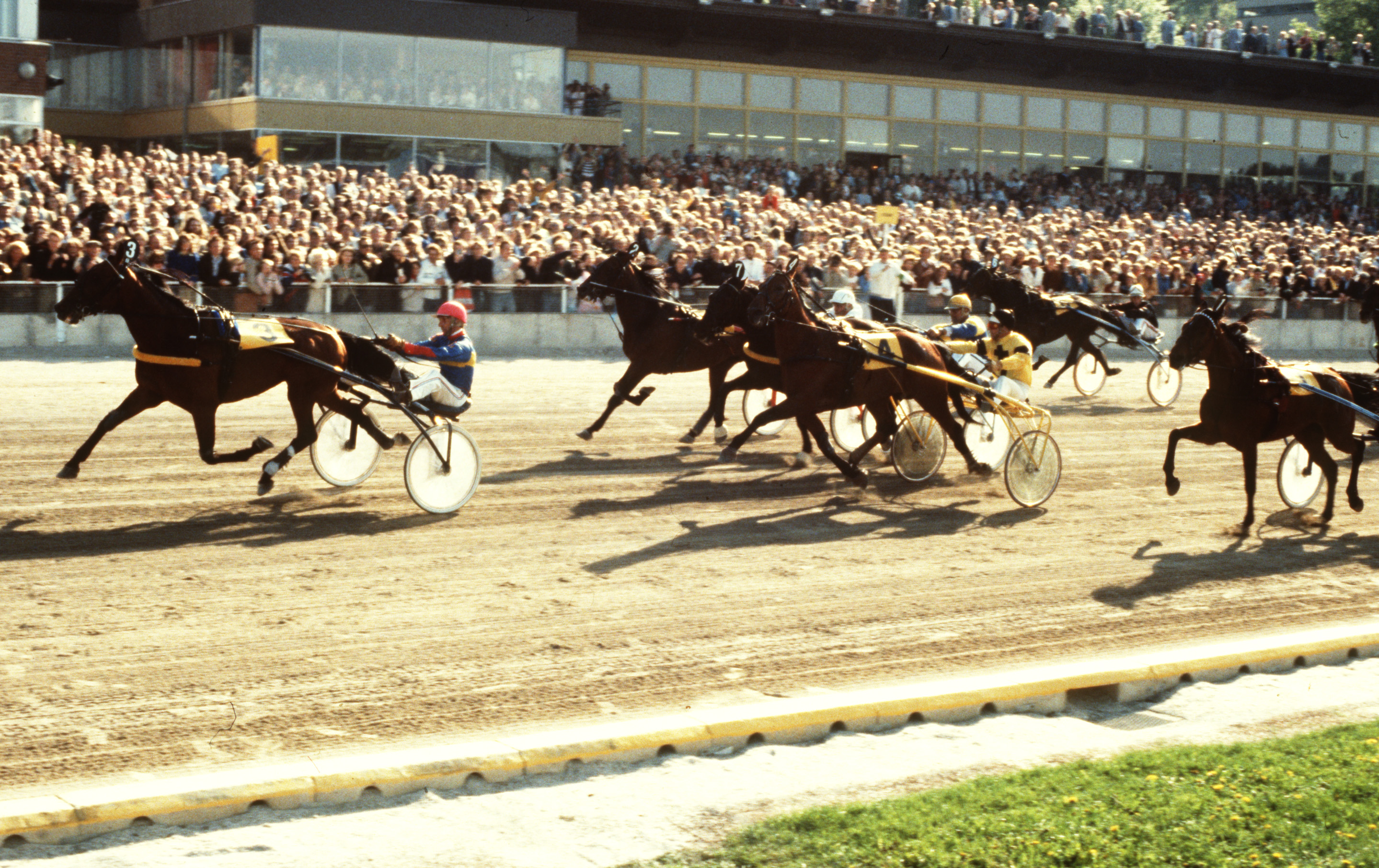 Kusken Berndt Lindstedt och travaren Pershing (ekipage nr. 3) vinner Elitloppet 1979 på Solvalla.